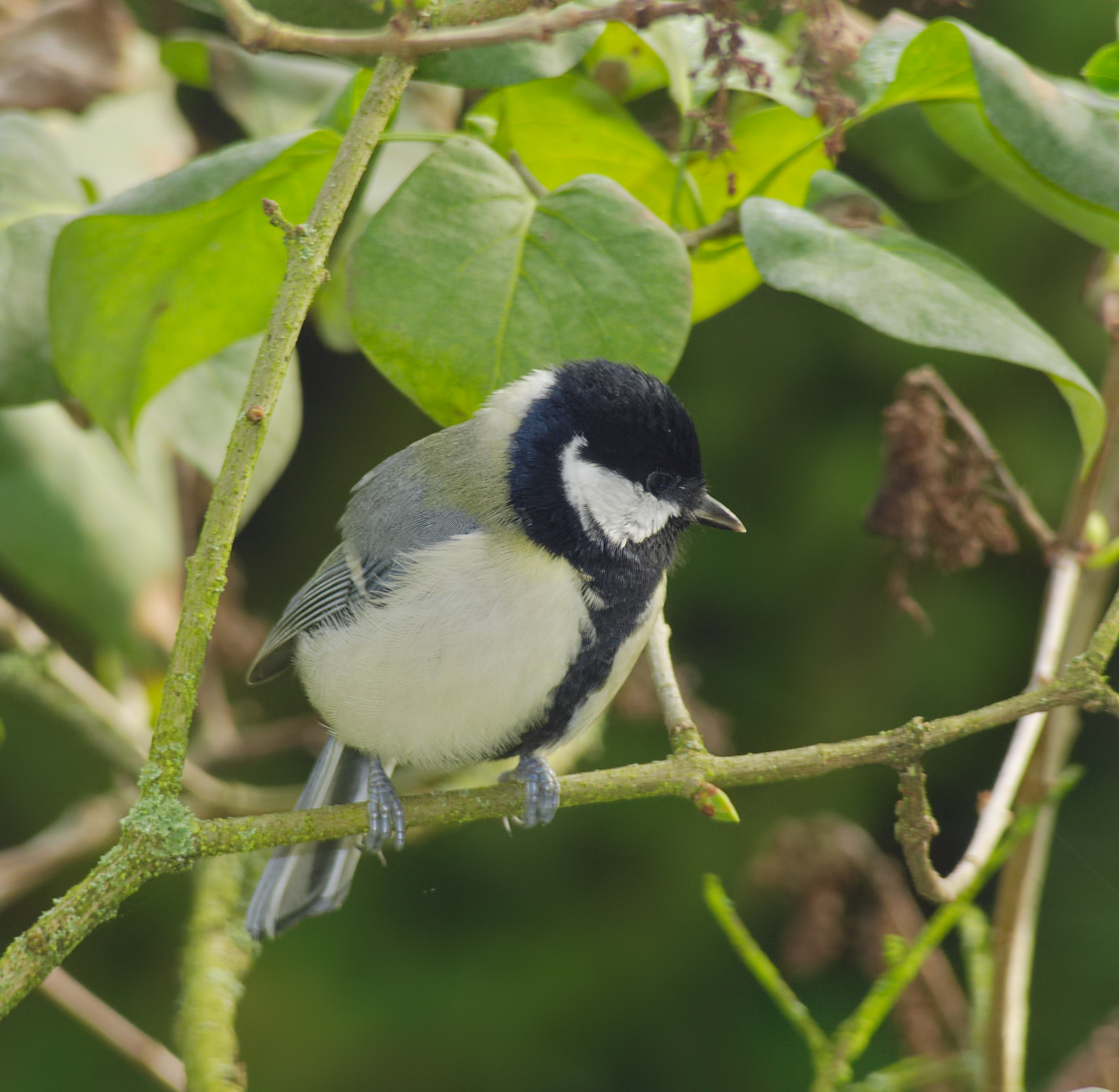 Kohlmeise - Parus major. Aufgenommen in Mannheim-Vogelstang, Baden-Württemberg, Deutschland.